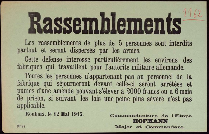 Rassemblement Roubaix 12.5.1915